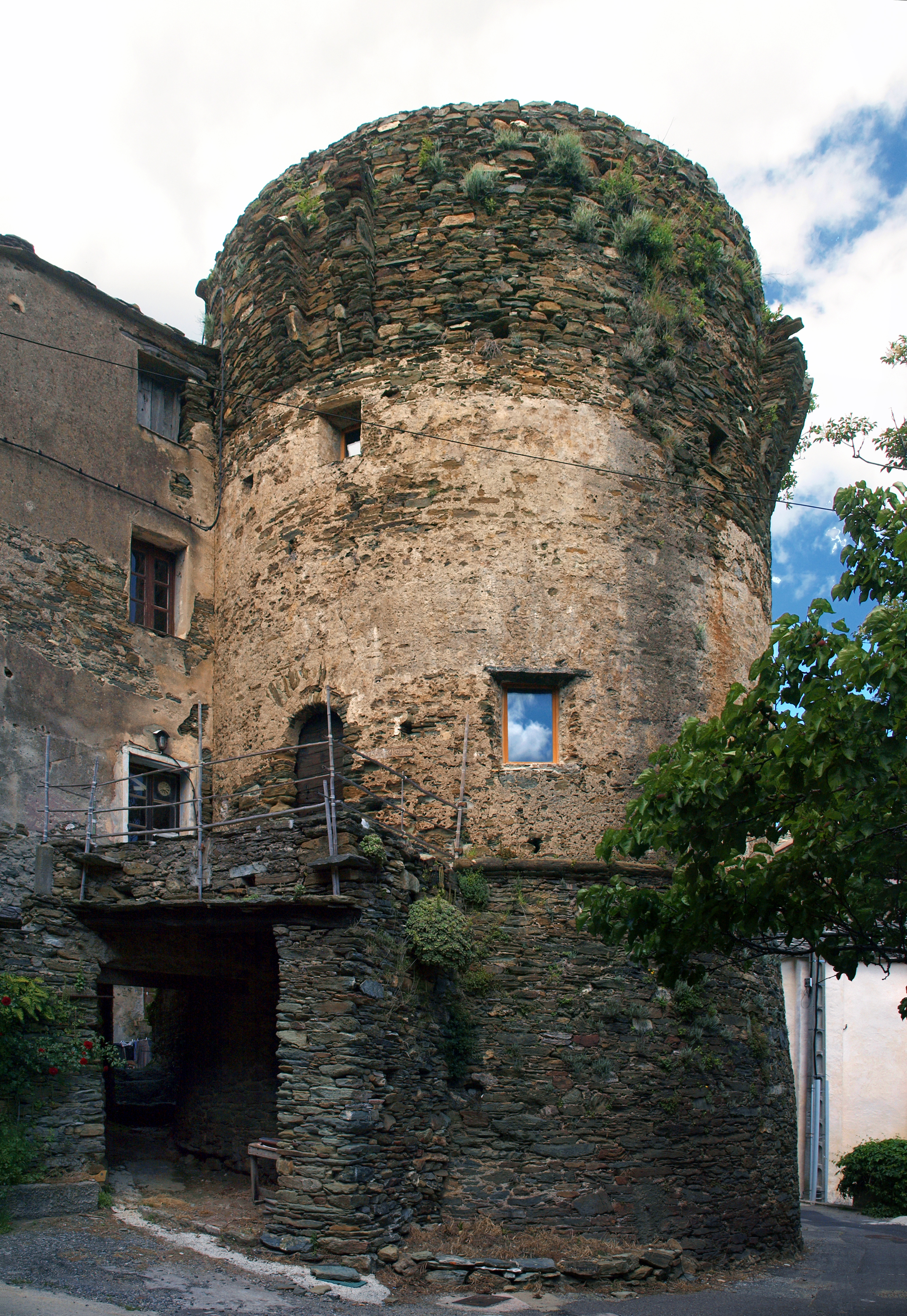 Sisco, Cap Corse (Corse) - Tour génoise de Balba